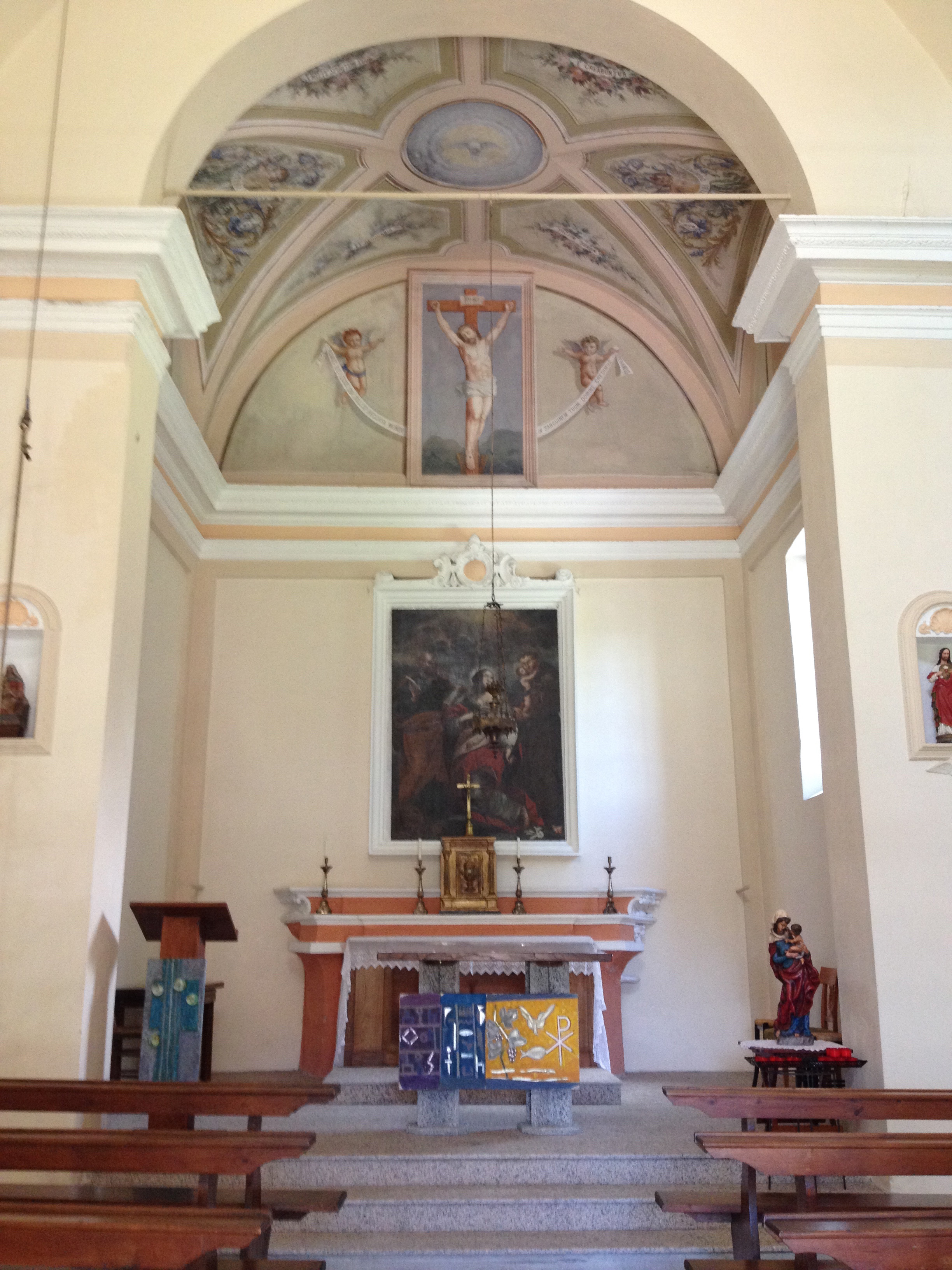 Innenansicht der Kapelle Sant’Agata in Astano